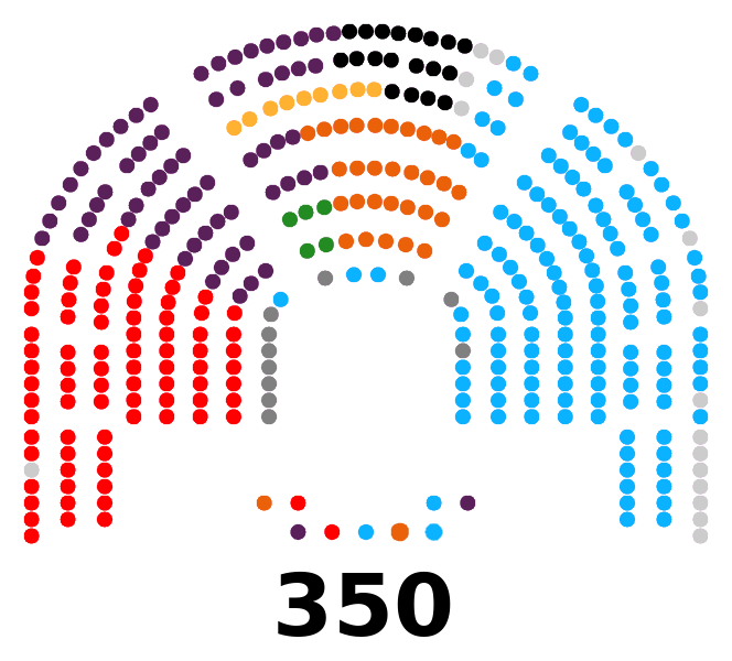 Conforme con lo inscrito en la web del Congreso.